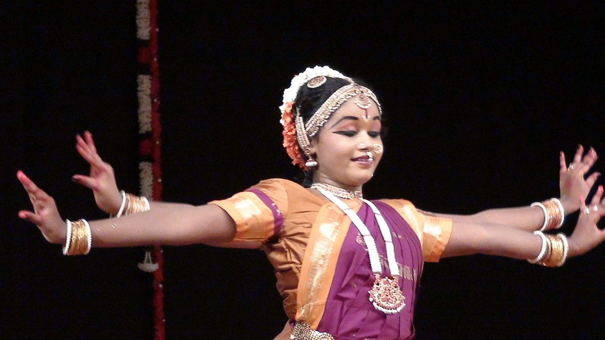 தமிழகத்தின் மிகத் தொன்மையான நாட்டிய வகையான பரதநாட்டியத்தில் அபிநயக் கோலத்தோடு காட்சி தரும் பெண்.